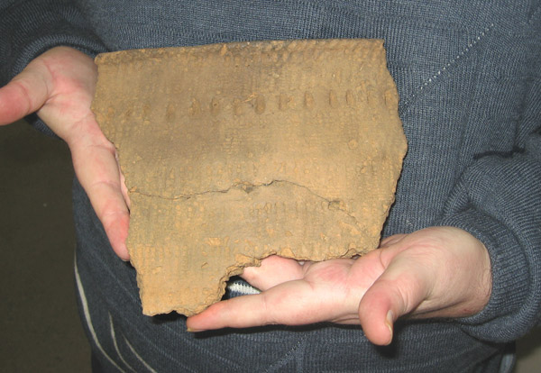 Фрагмент неолитического сосуда из раскопок на Охтинском мысу. Раскопки Санкт-Петербургской археологической экспедиции Северо-западного научно-исследовательского института культурного и природного наследия.